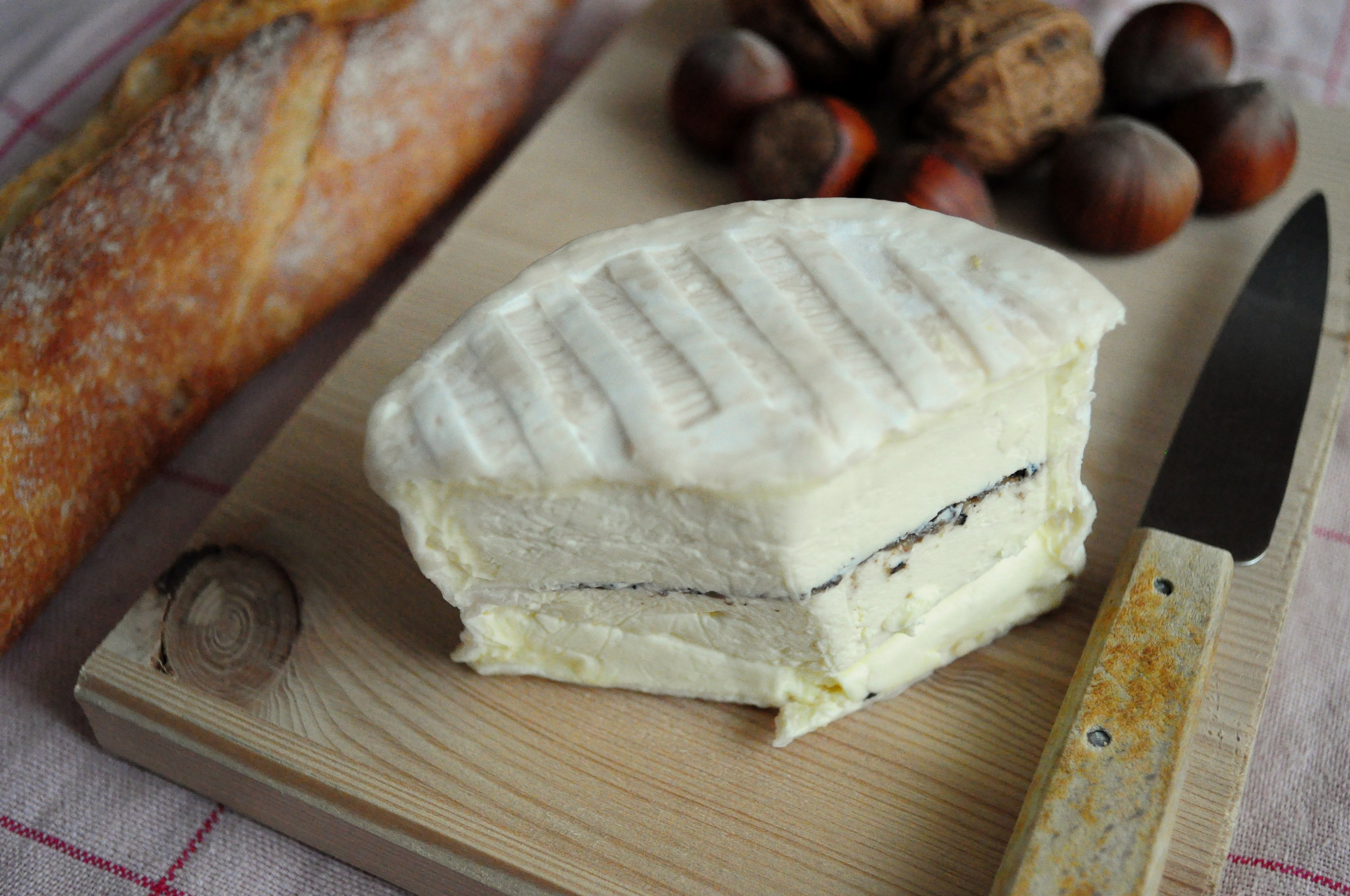 Brillat-Savarin truffé